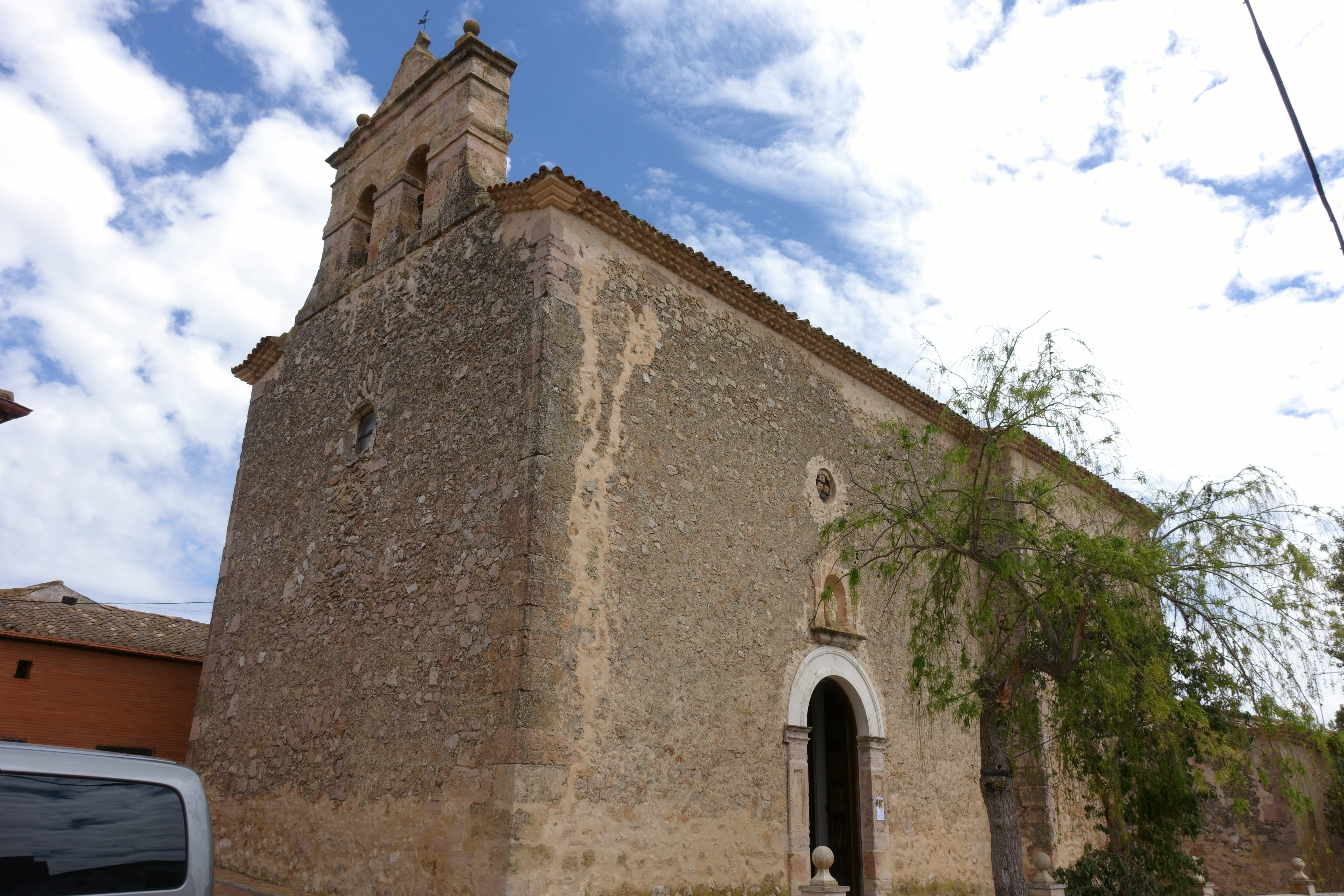 Iglesia de Nuestra Señora de la Asunción, Rada de Haro (Cuenca, España).